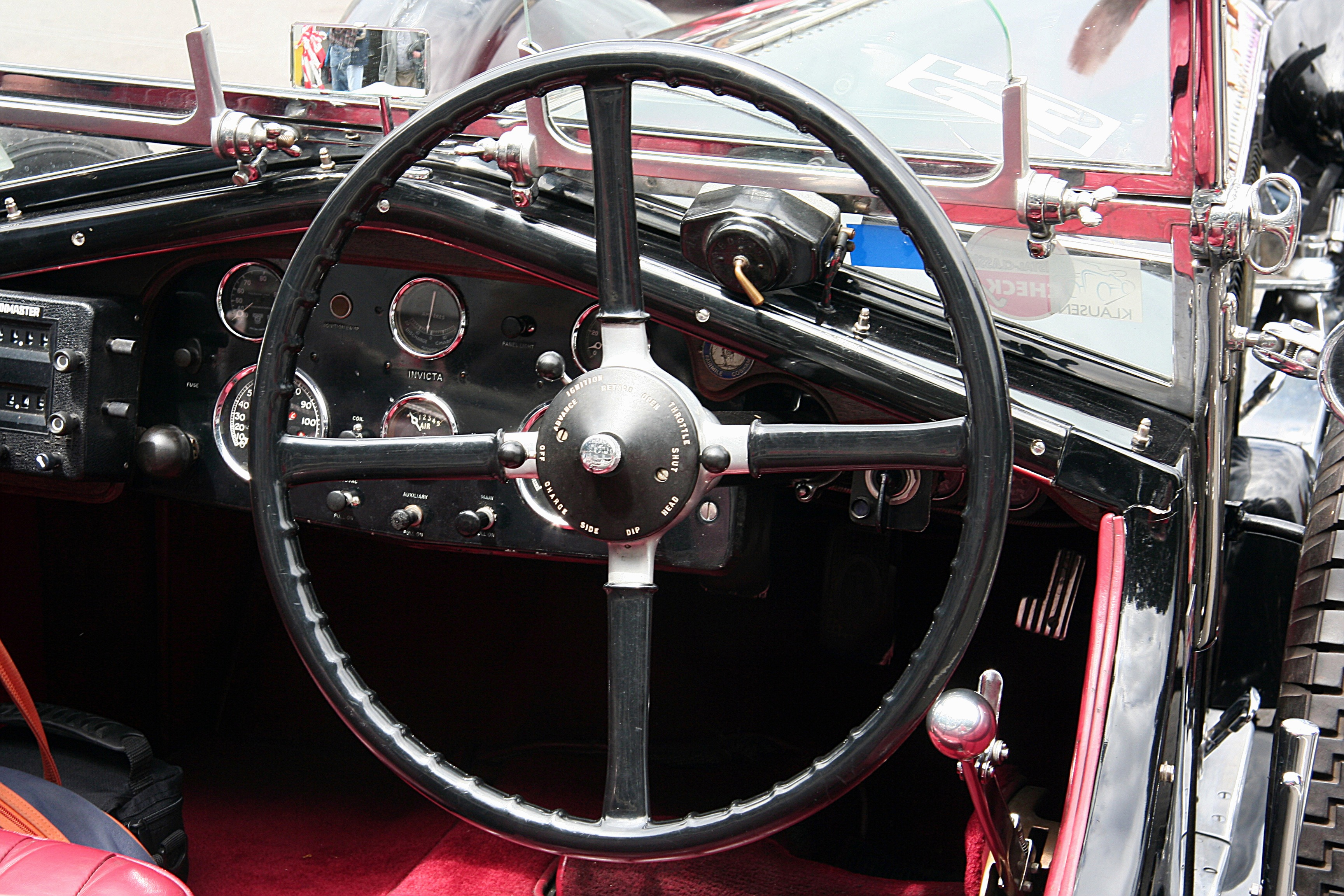 Invicta S-Type Rennversion, Baujahr 1931